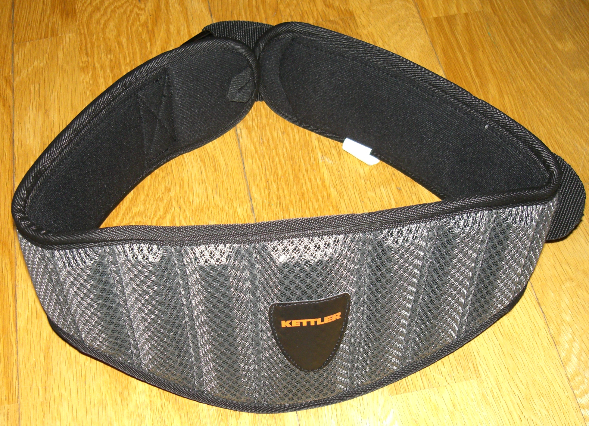 Wird beim Gewichtheben und Bodybuilding verwendet zur Entlastung des Rückens.